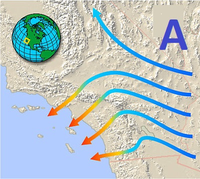 Carte montrant la position de l'anticyclone et le trajet des vents dans une situation de vent de Santa Ana.